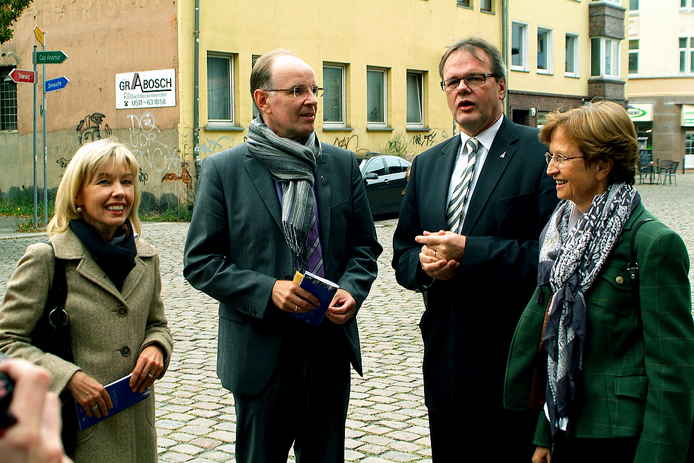 Trafen 2012 anlässlich der 6. Langen Nacht der Kirchen zum "Baustellen-Spaziergang" in der Christuskirche von Hannover ein (von links): Doris Schröder-Köpf, Landesbischof Ralf Meister, Stadtsuperintendent Hans-Martin Heinemann sowie Professor Gudrun Schröfel, Leiterin des Mädchenchors Hannover, hier auf dem Conrad-Wilhelm-Hase-Platz ...